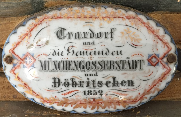 Schild von 1852 an der Peternell-Orgel in der Dorfkirche von Münchengosserstädt mit der Aufschrift "Traxdorf und die Gemeinden Münchengosserstädt und Döbritschen 1852"